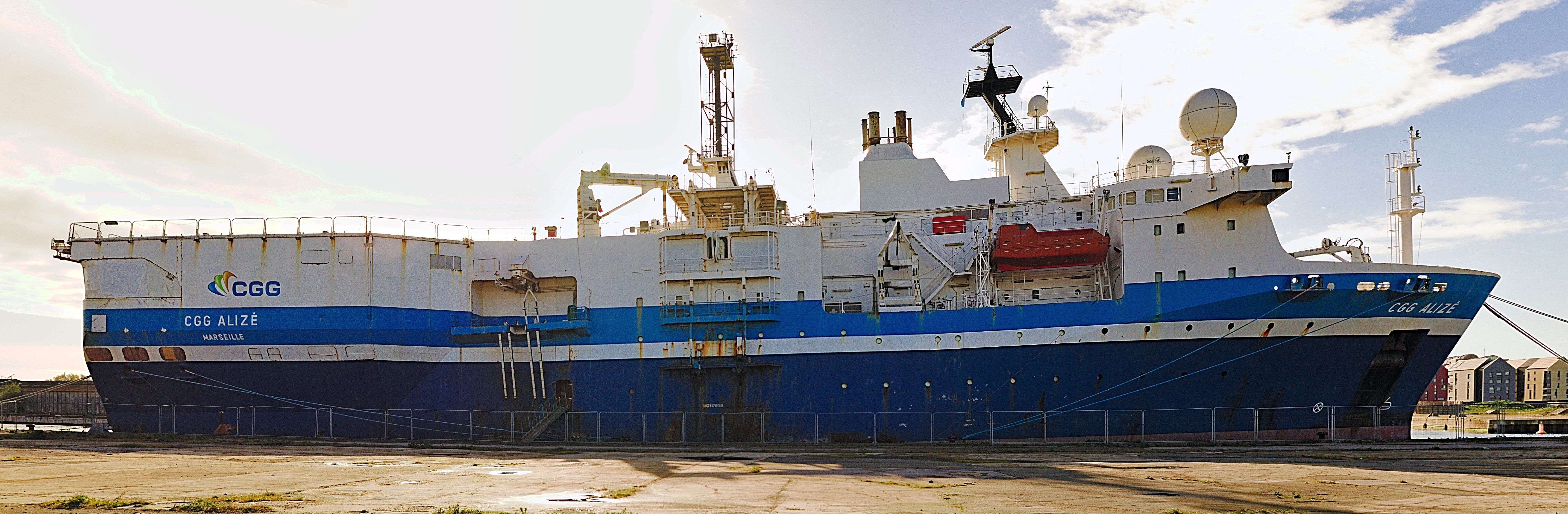 Le CGG Alizé à quai, au port de Dunkerque